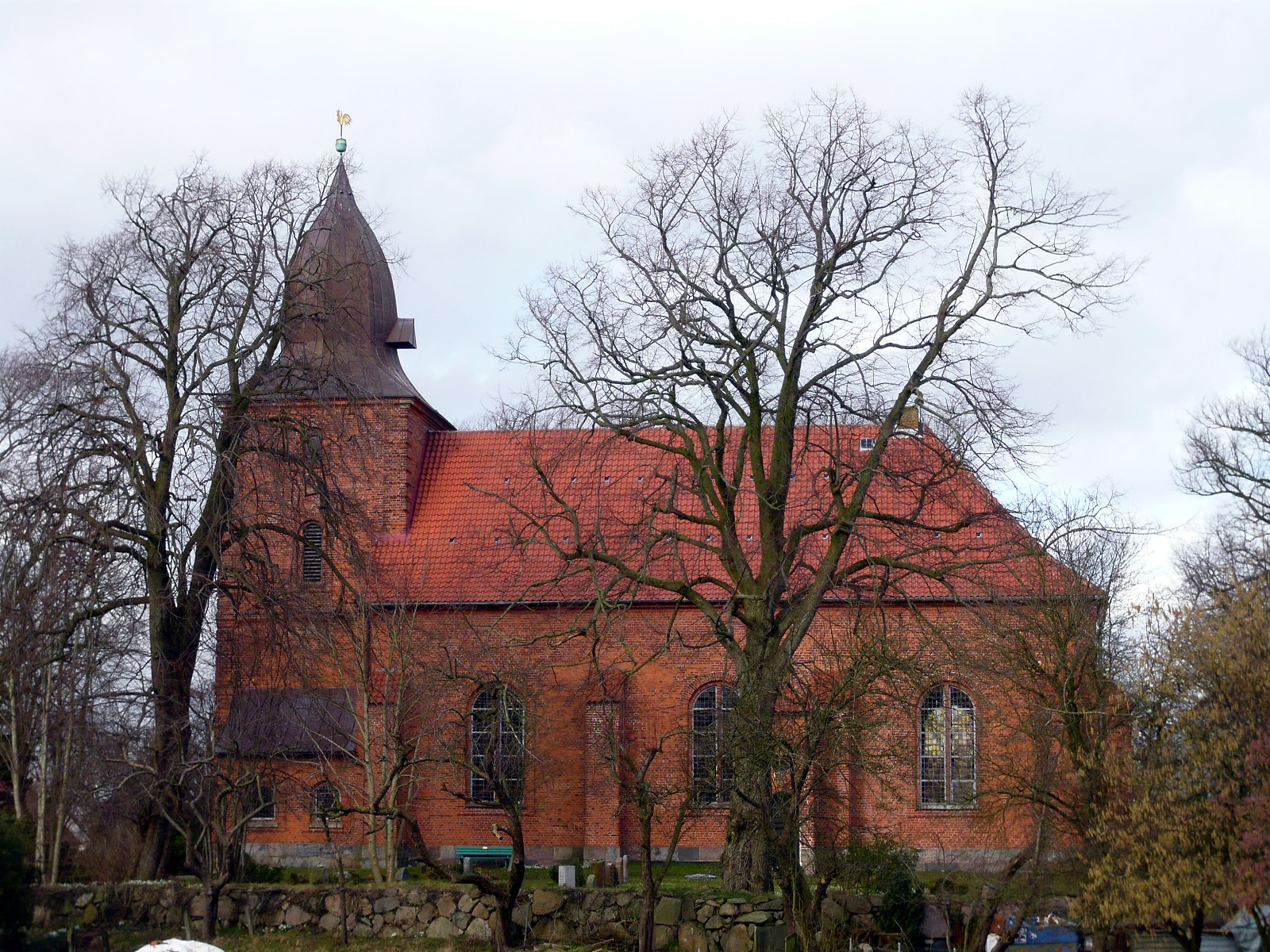 Die Dreifaltigkeitskirche in Krusendorf wurde 1733-35 gebaut und 1737 eingeweiht.